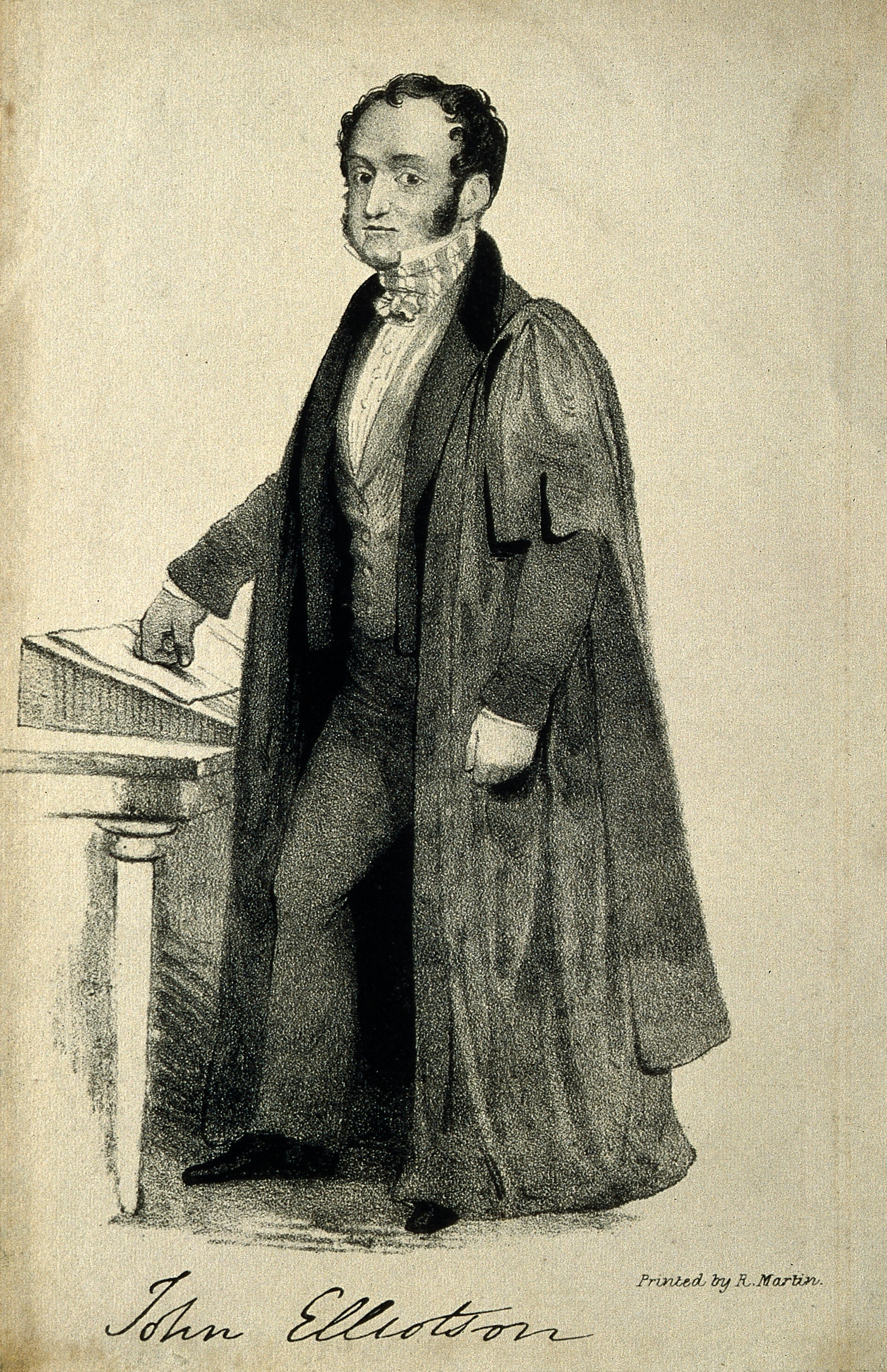 Genre/Technique: Portrait prints. Lithographs. Subject name: Elliotson, John, 1791-1868.